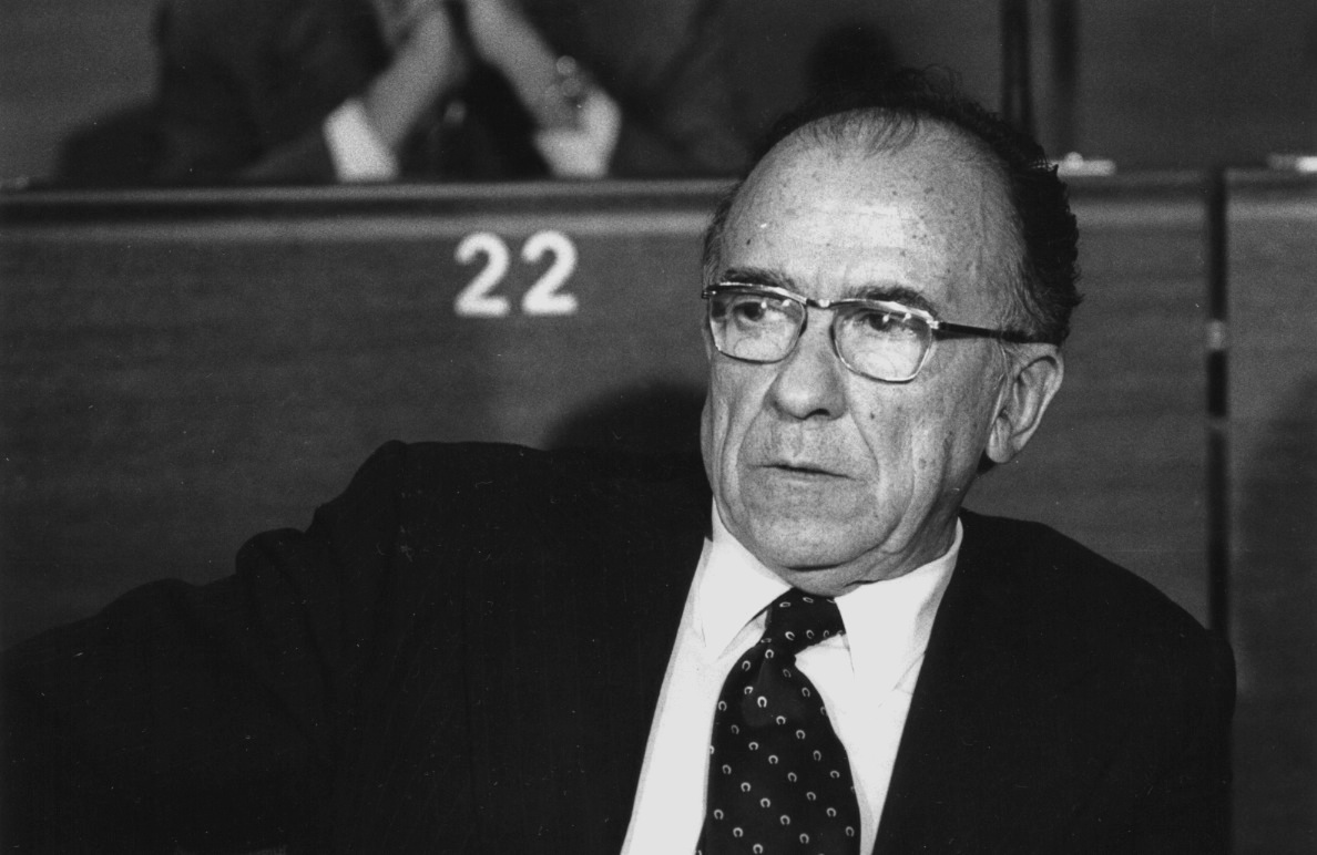 Santiago José Carrillo Solares (né le 18 janvier 1915 à Gijón, Asturies et mort le 18 septembre 2012 à Madrid1) est un homme politique et un écrivain espagnol, dirigeant du PCE (Partido Comunista de España, Parti communiste d'Espagne) de 1960 à 1982. Après la mort de Francisco Franco (20 novembre 1975), il a joué un rôle important dans le processus de la transition démocratique espagnole, qui aboutit à la ratification de la Constitution espagnole de 1978.